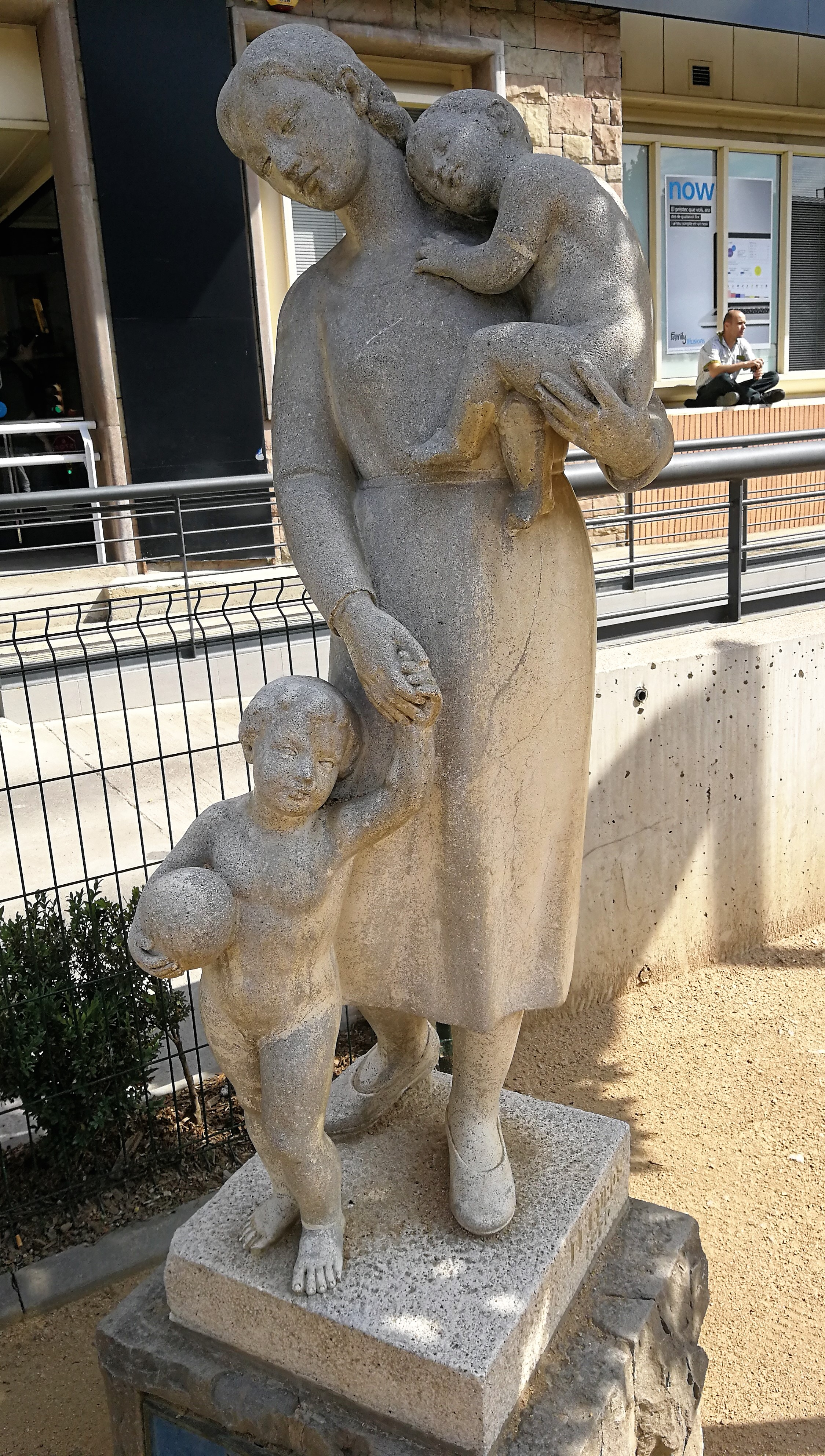 Lluís Curós i Morató: Zum Andenken an Dr. Agusti i Trilla (Olot; Plaça dels Coloms, 1970)